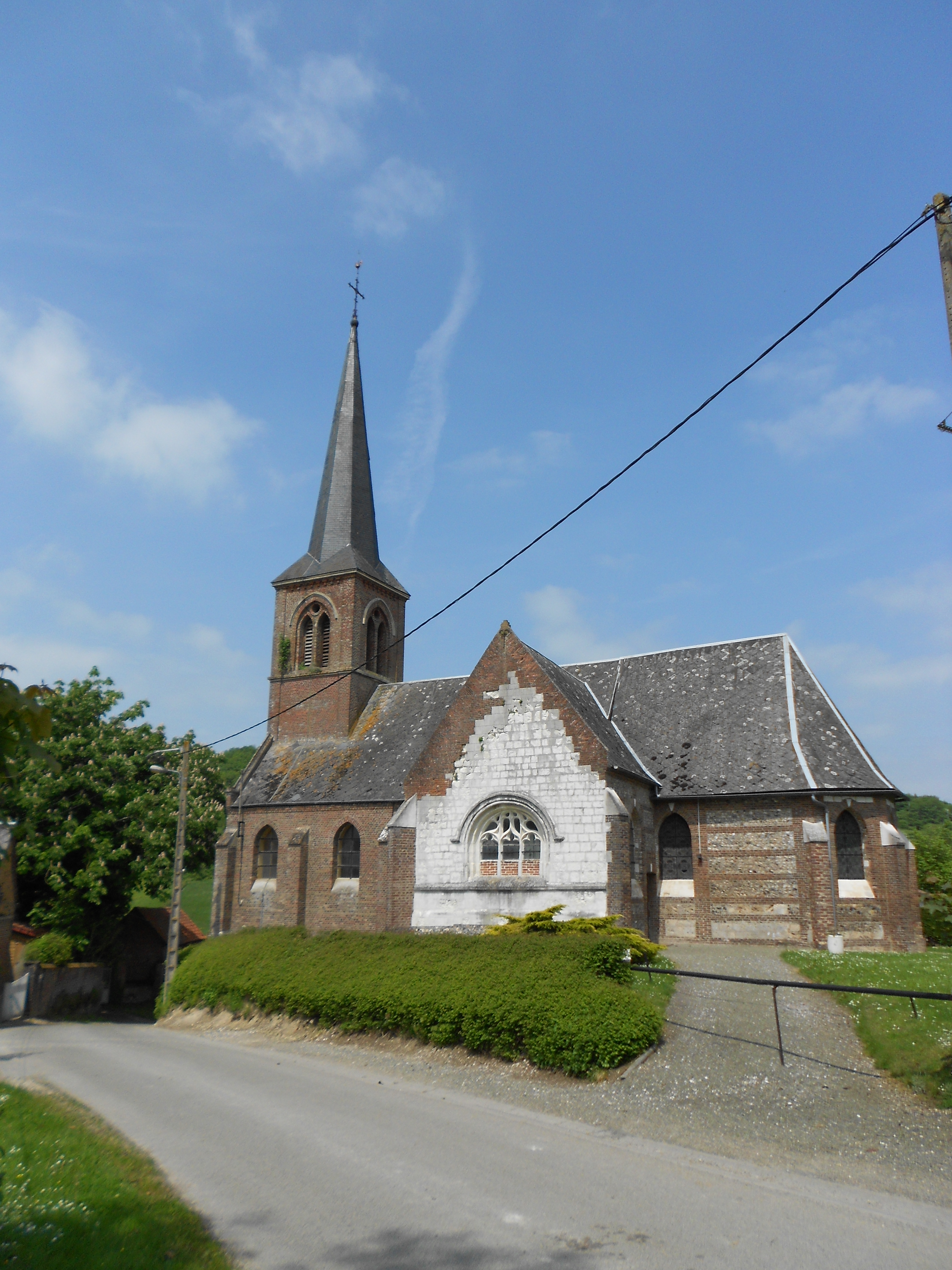 Eglise de Bazinval, Seine Maritime